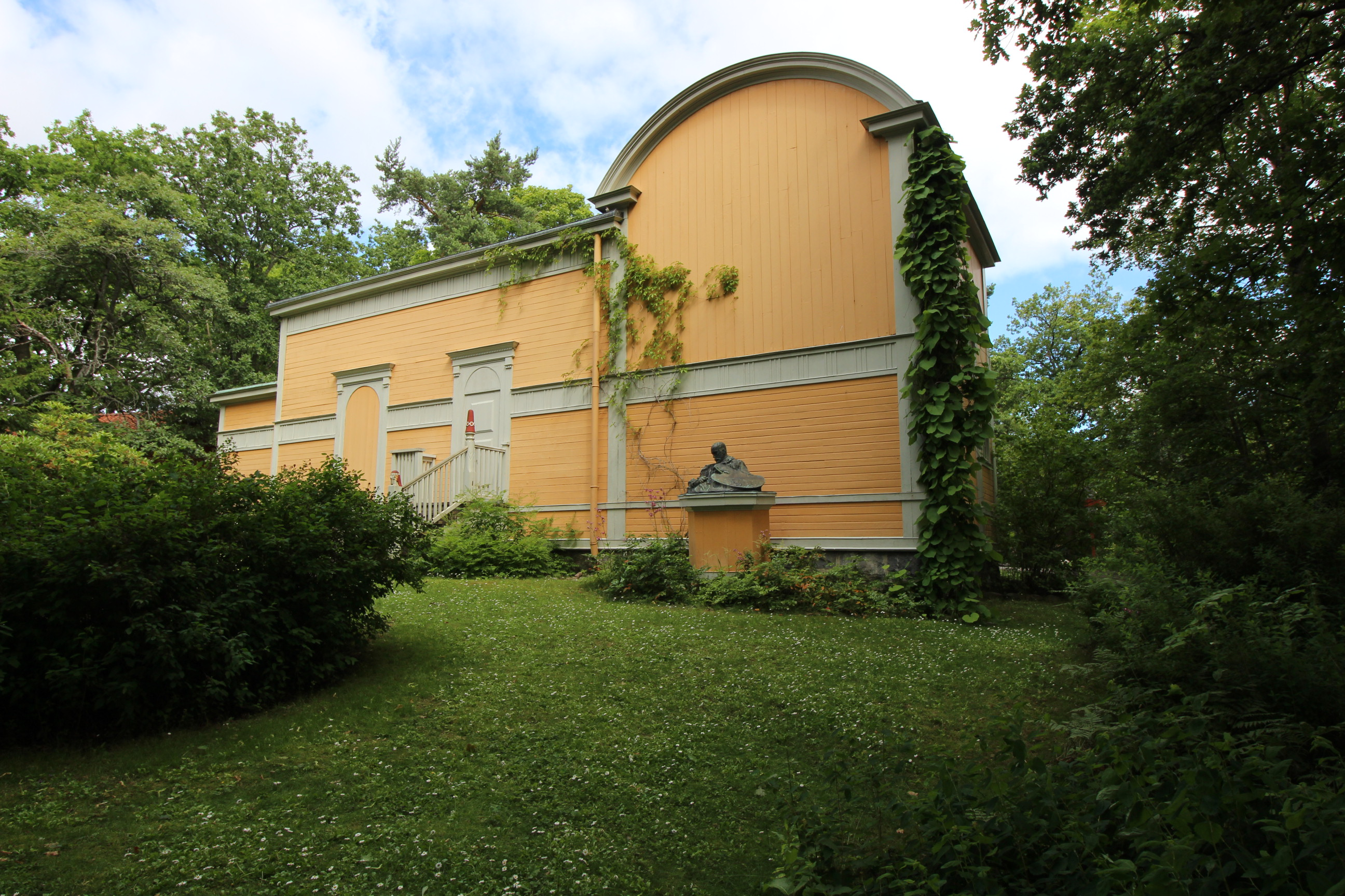 Julius Kornbergs ateljé på Skansen, Stockholm. Ursprungligen på Lilla Skuggan (Heleneberg), Norra Djurgården